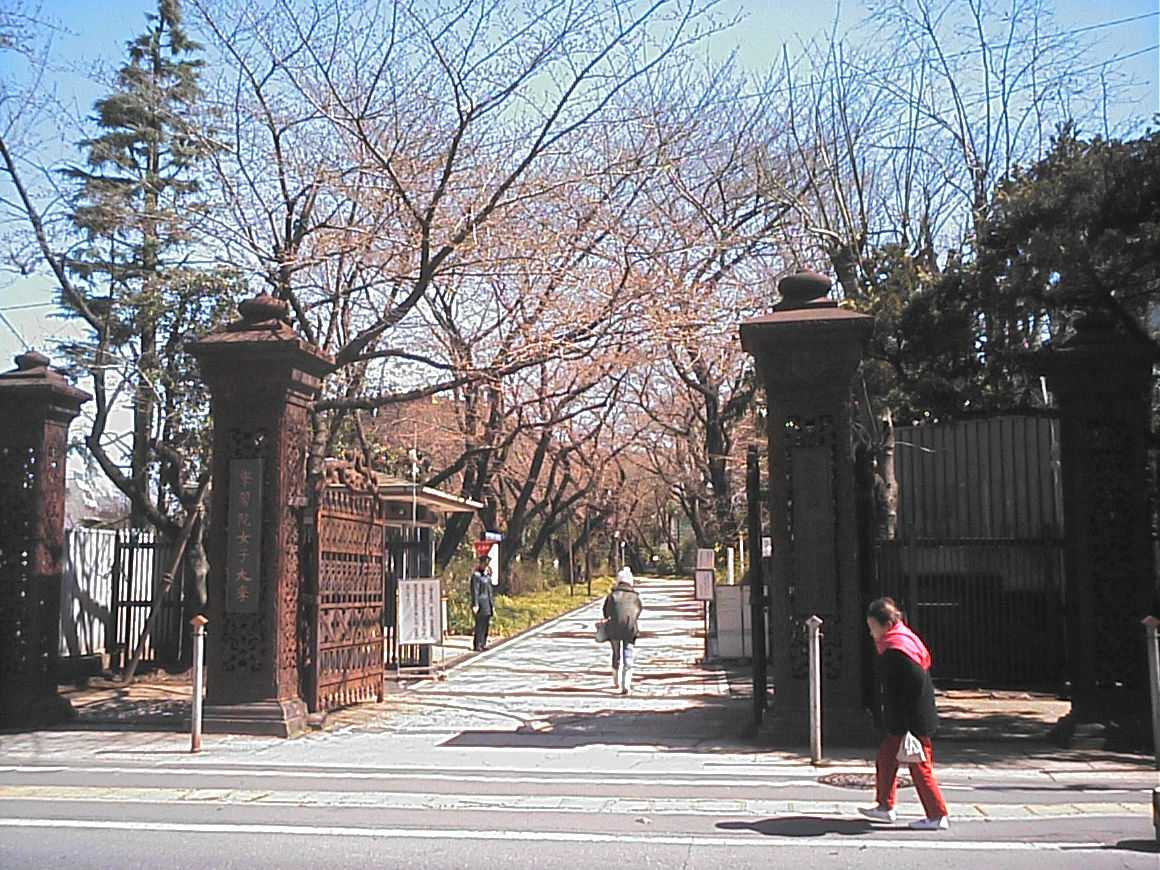 学習院女子大学正門（2006年5月13日投稿者が撮影）